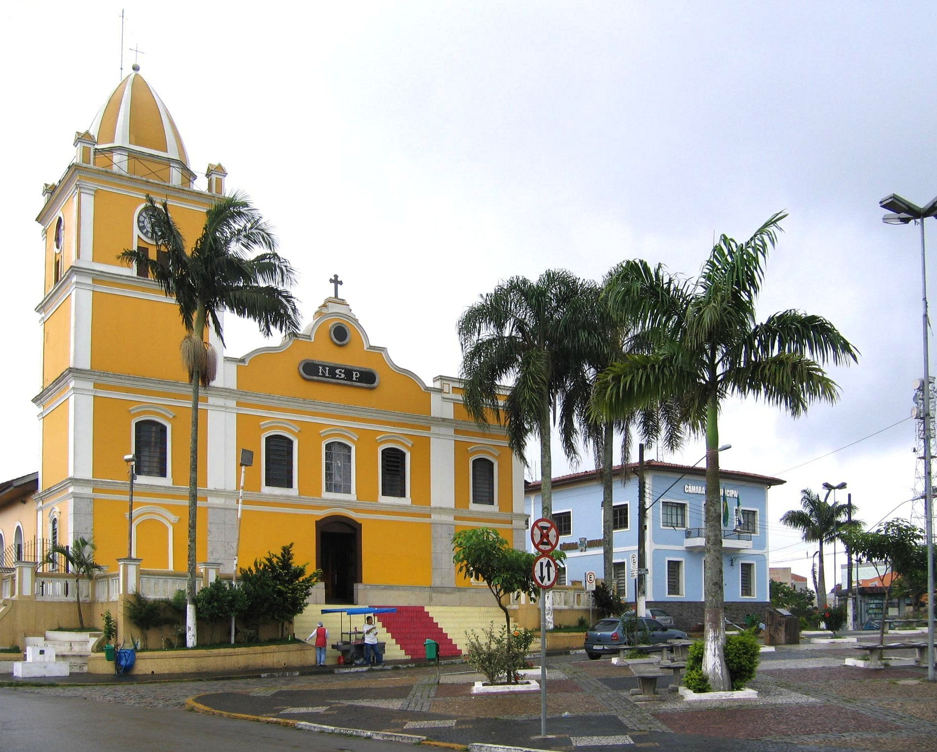 Igreja matriz de Itapecerica da Serra